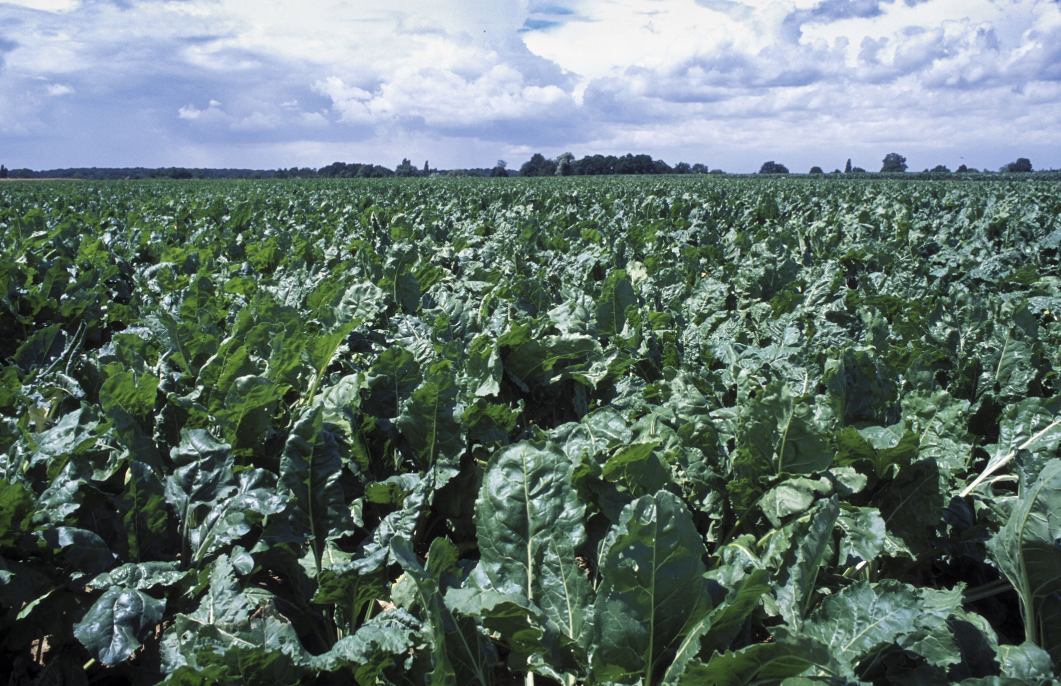 INRA, Jean Weber